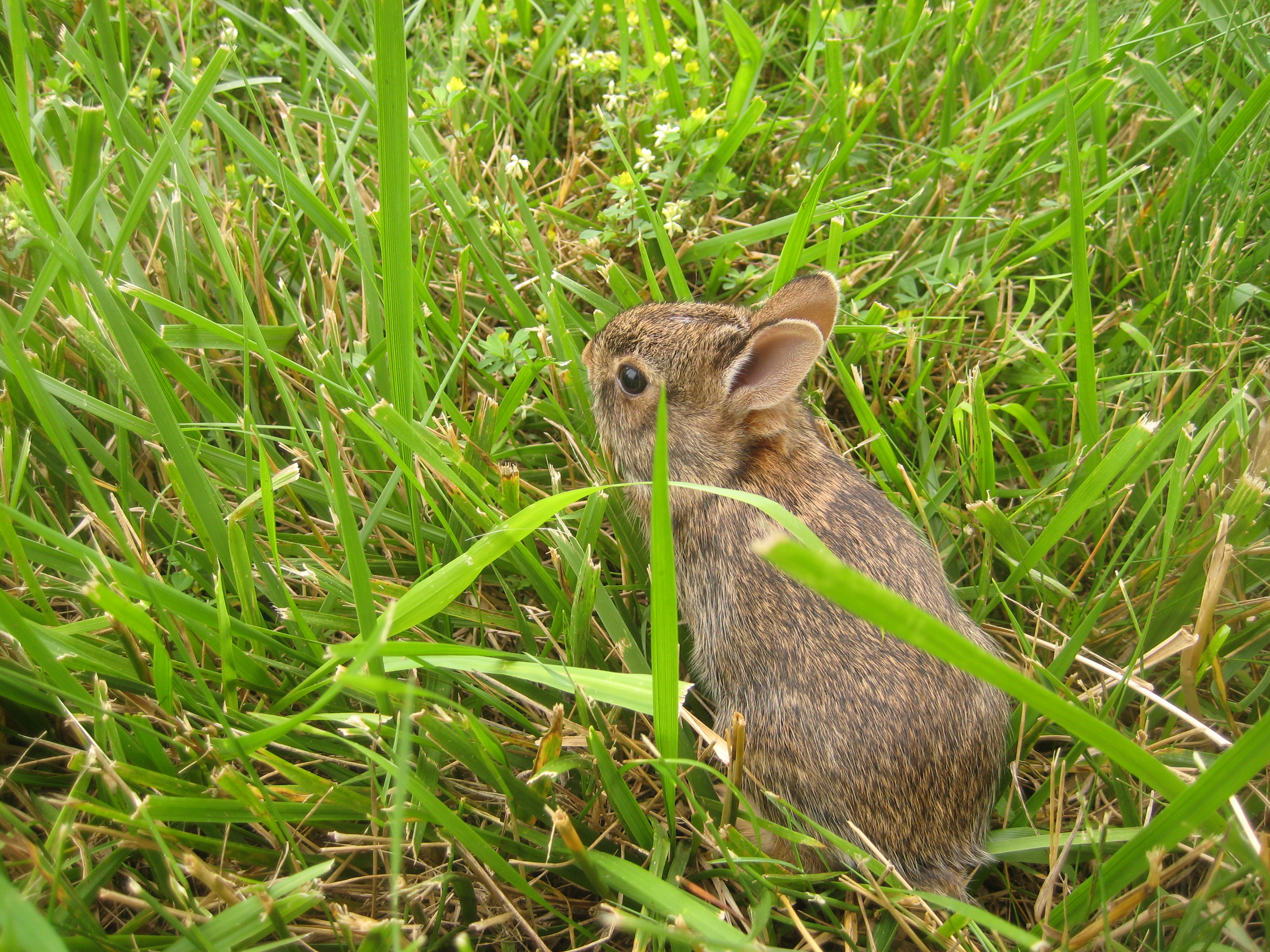 A baby rabbit.